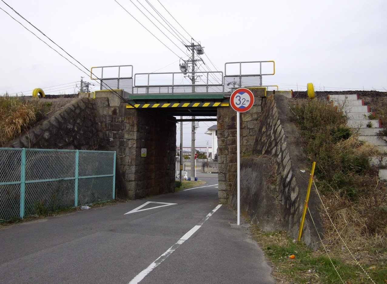 乙川駅西にある半田街道架道橋